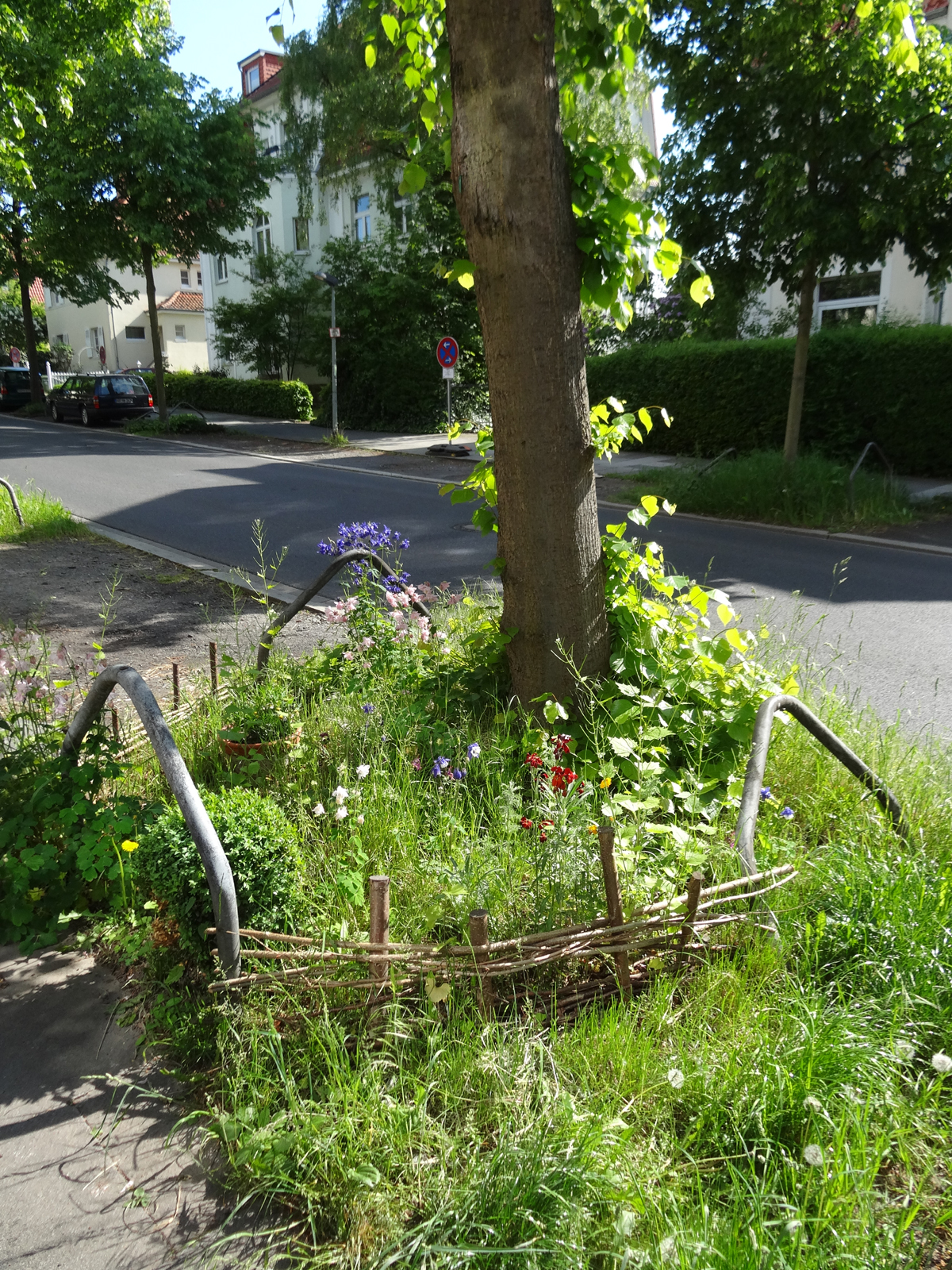 Von Anwohnern zurechtgemachte Baumscheibe in Göttingen (Ecke Dahlmannstraße/Rohnsweg) in fortschreitender Sukzession